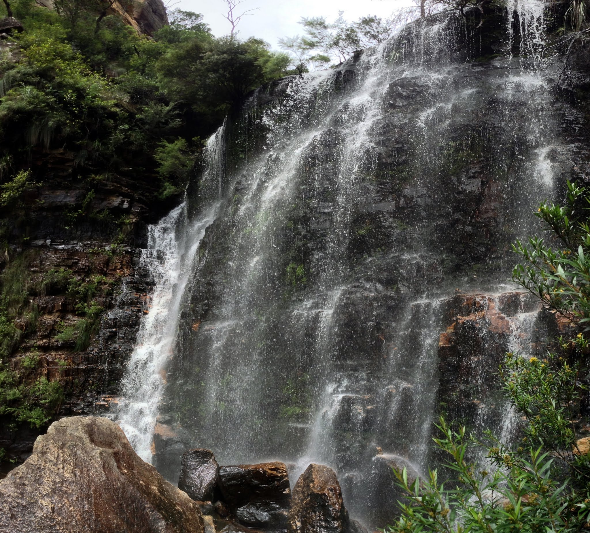 Beauchamp Falls